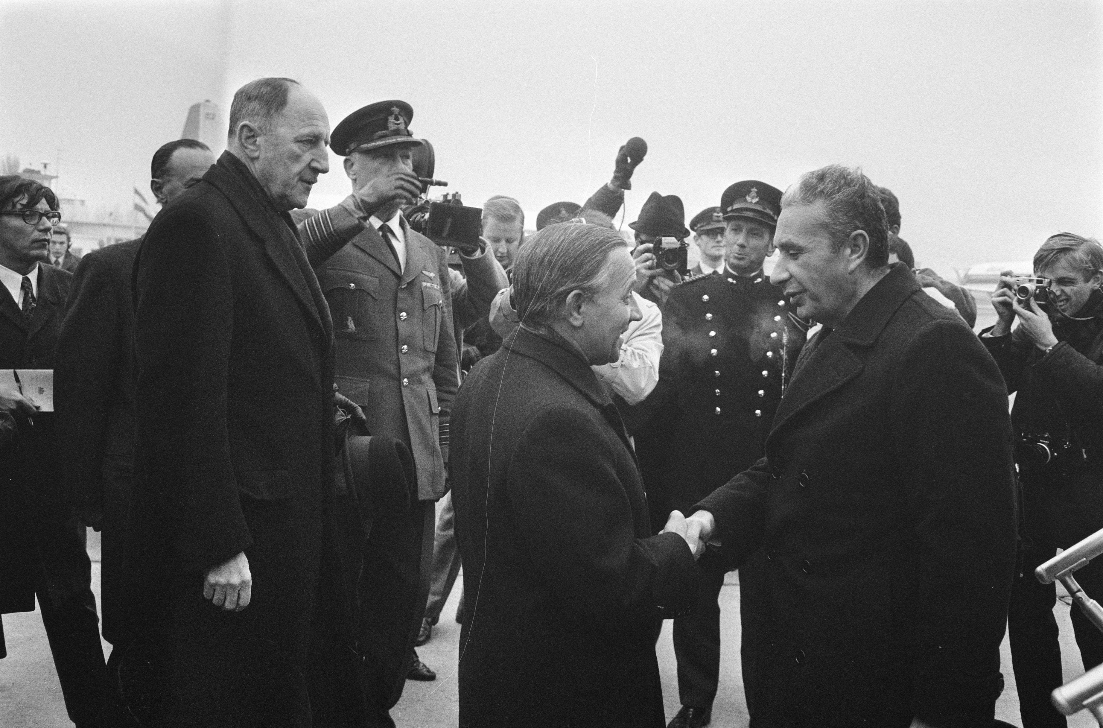 Collectie / Archief : Fotocollectie Anefo Reportage / Serie : [ onbekend ] Beschrijving : Aankomst Bondskanselier Willy Brandt van Duitsland op Ypenburg. Aankomst Moro Datum : 1 december 1969 Trefwoorden : aankomsten Persoonsnaam : Bondskanselier Willy Brandt Fotograaf : Koch, Eric / Anefo Auteursrechthebbende : Nationaal Archief Materiaalsoort : Negatief (zwart/wit) Nummer archiefinventaris : bekijk toegang 2.24.01.05 Bestanddeelnummer : 923-0338